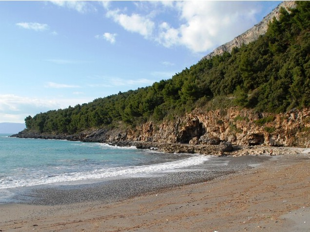 Fiumicello's caves in Maratea.